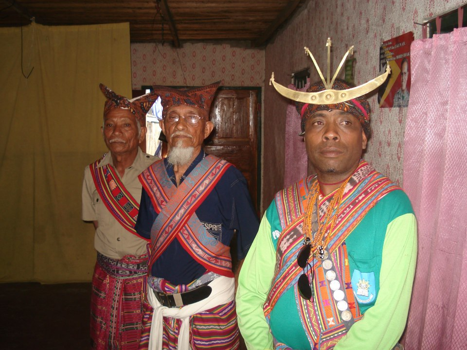 Fohoren